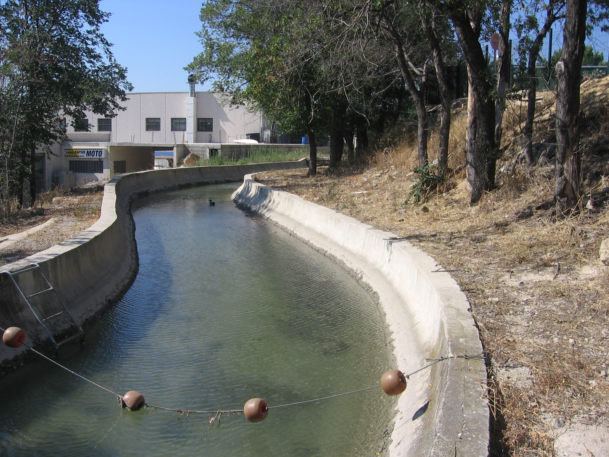 Le canal de Marseille, au nord du château Saint-Antoine. La famille Pagnol passait par là vers 1905.